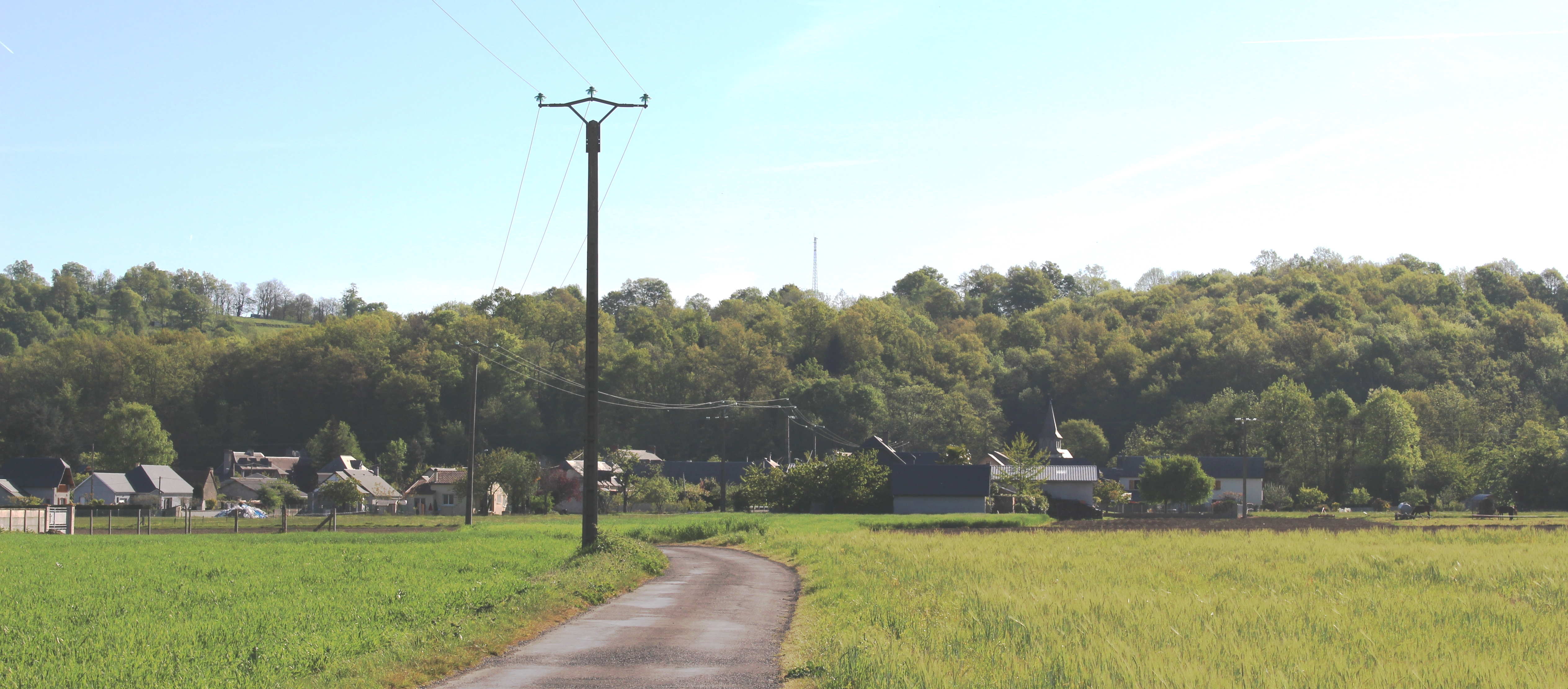 Antist (Hautes-Pyrénées)